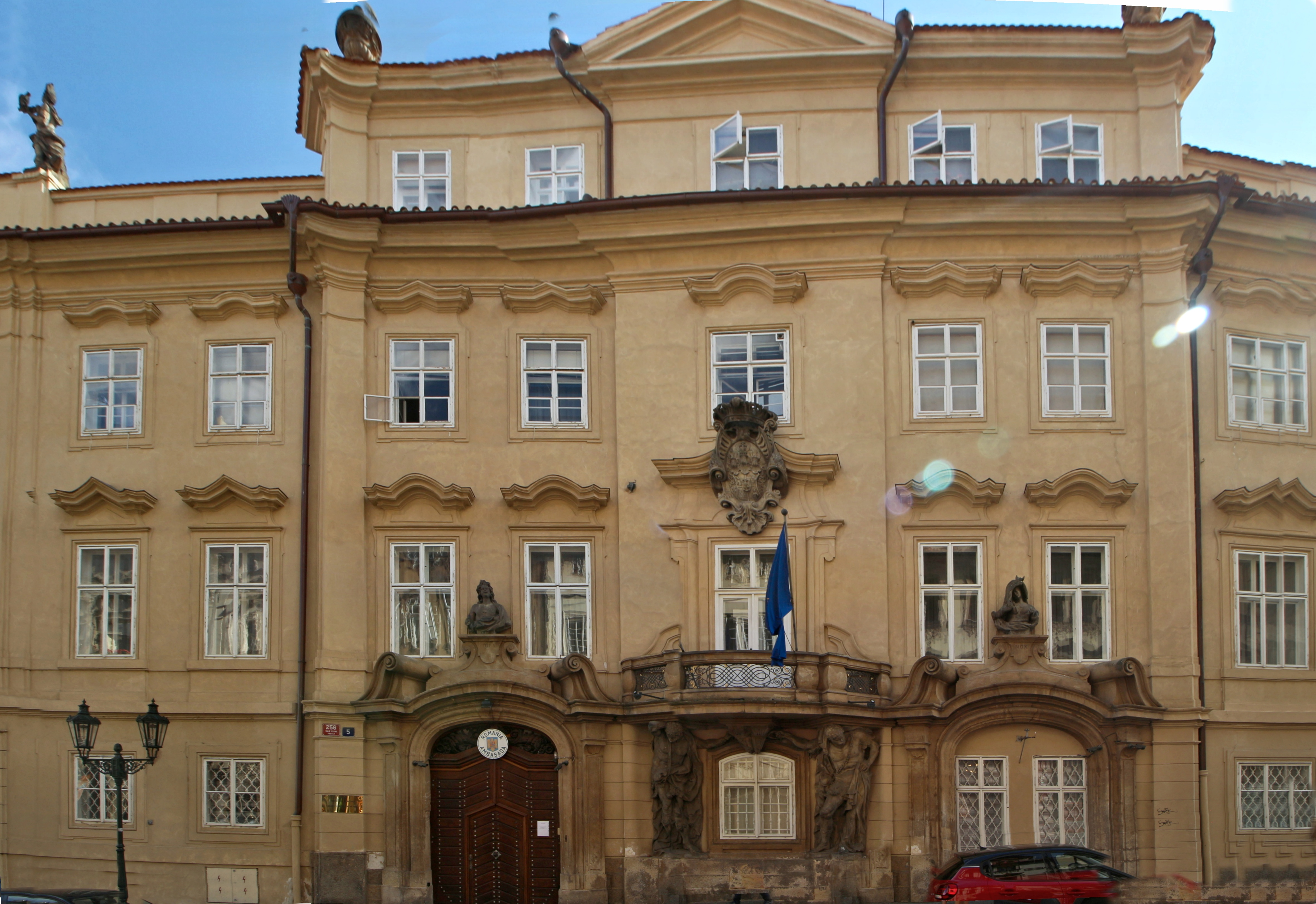 Praha 1-Malá Strana, Nerudova ulice